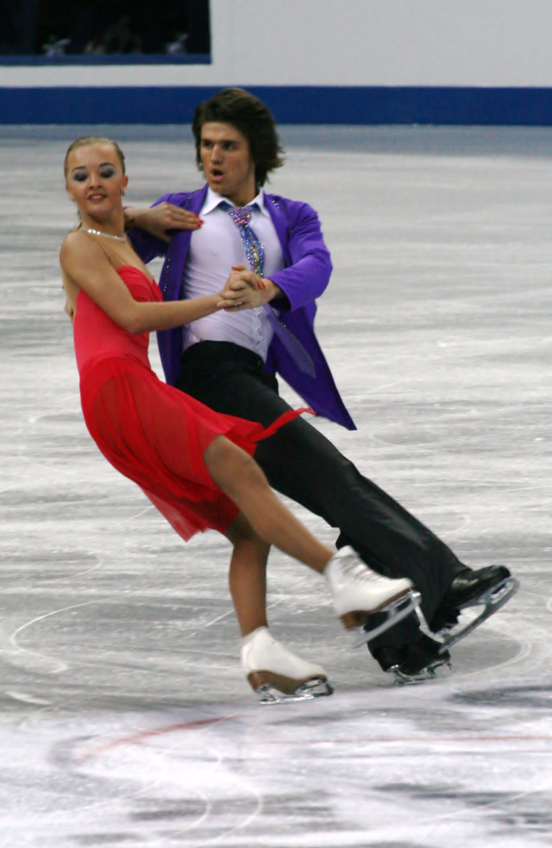 Александра Степанова и Иван Букин (Россия) на финале Гран-при среди юниоров 2012-2013. Короткий танец.